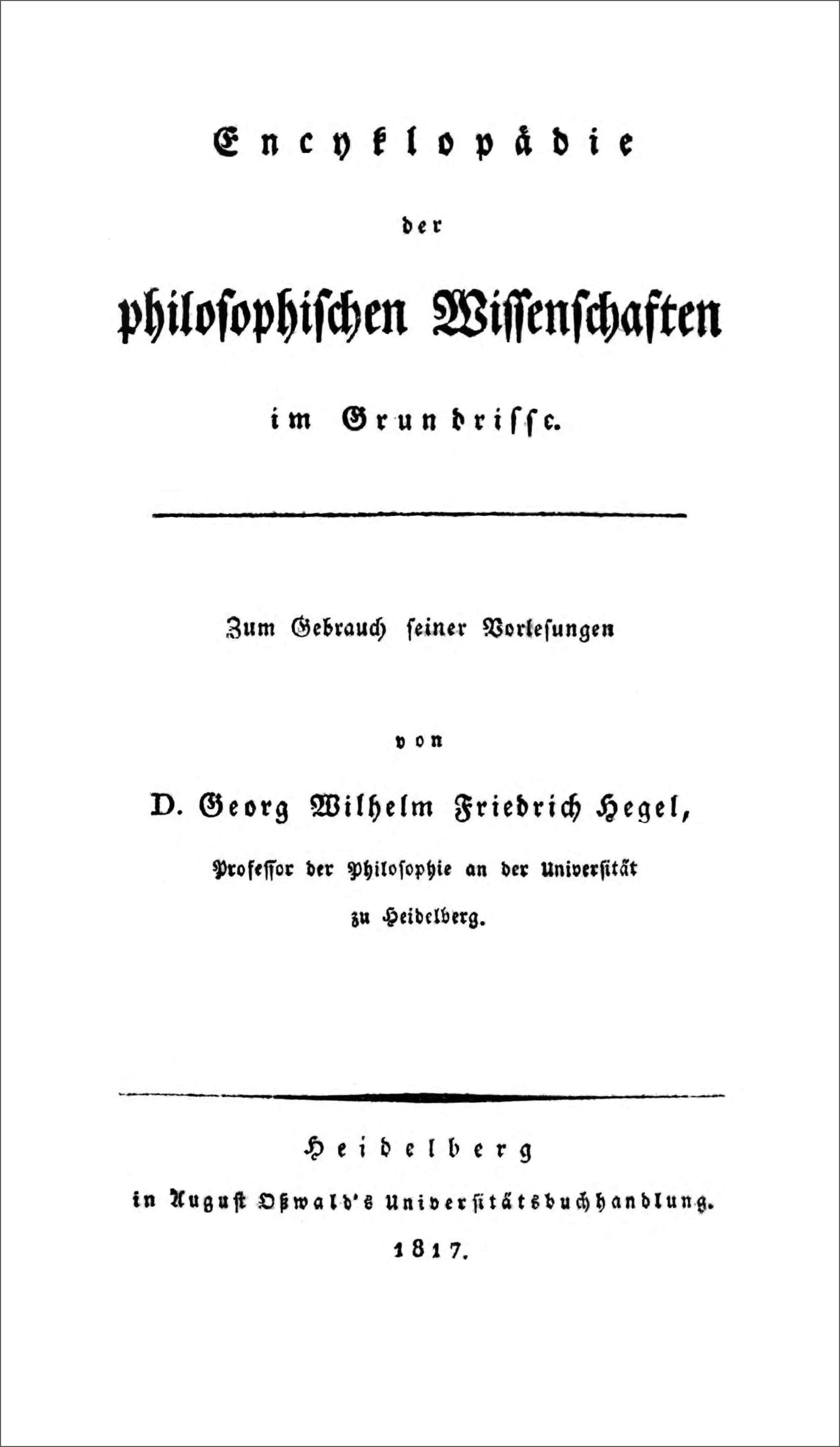 Encyklopädie der philosophischen Wissenschaften im Grundrisse